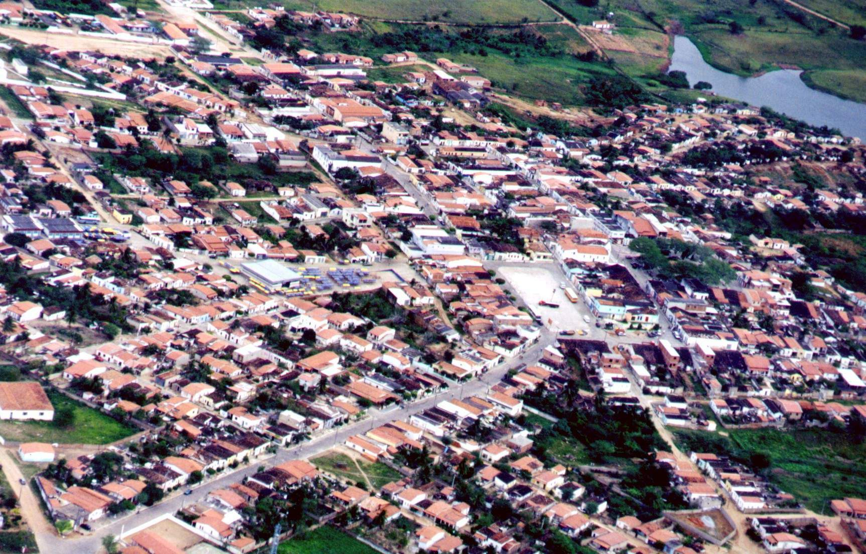 Foto de Capela do Alto Alegre - Bahia - Brasil.